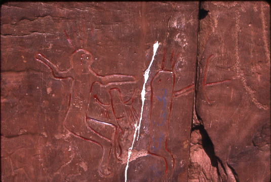 Gravure préhistorique du sud Oranais (Algérie), Thyout